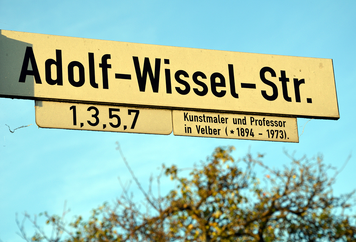 Straßenschild Adolf-Wissel-Straße mit Legendentafel für Adolf Wissel: „Kunstmaler und Professor in Velber (* 1894 - 1973“ ...